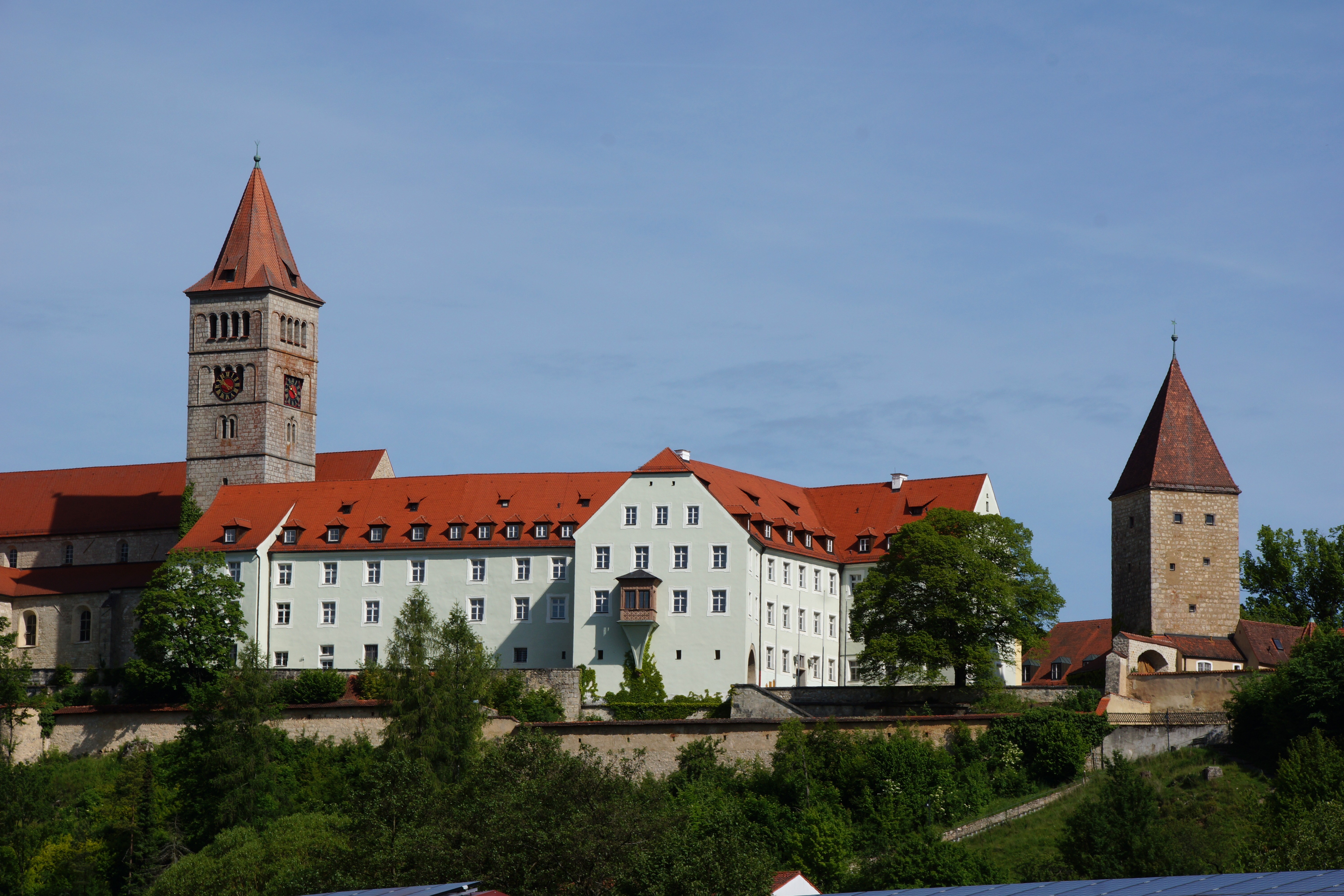 Die Klosterburg von Kastl über dem Oberpfälzer Lauterachtal